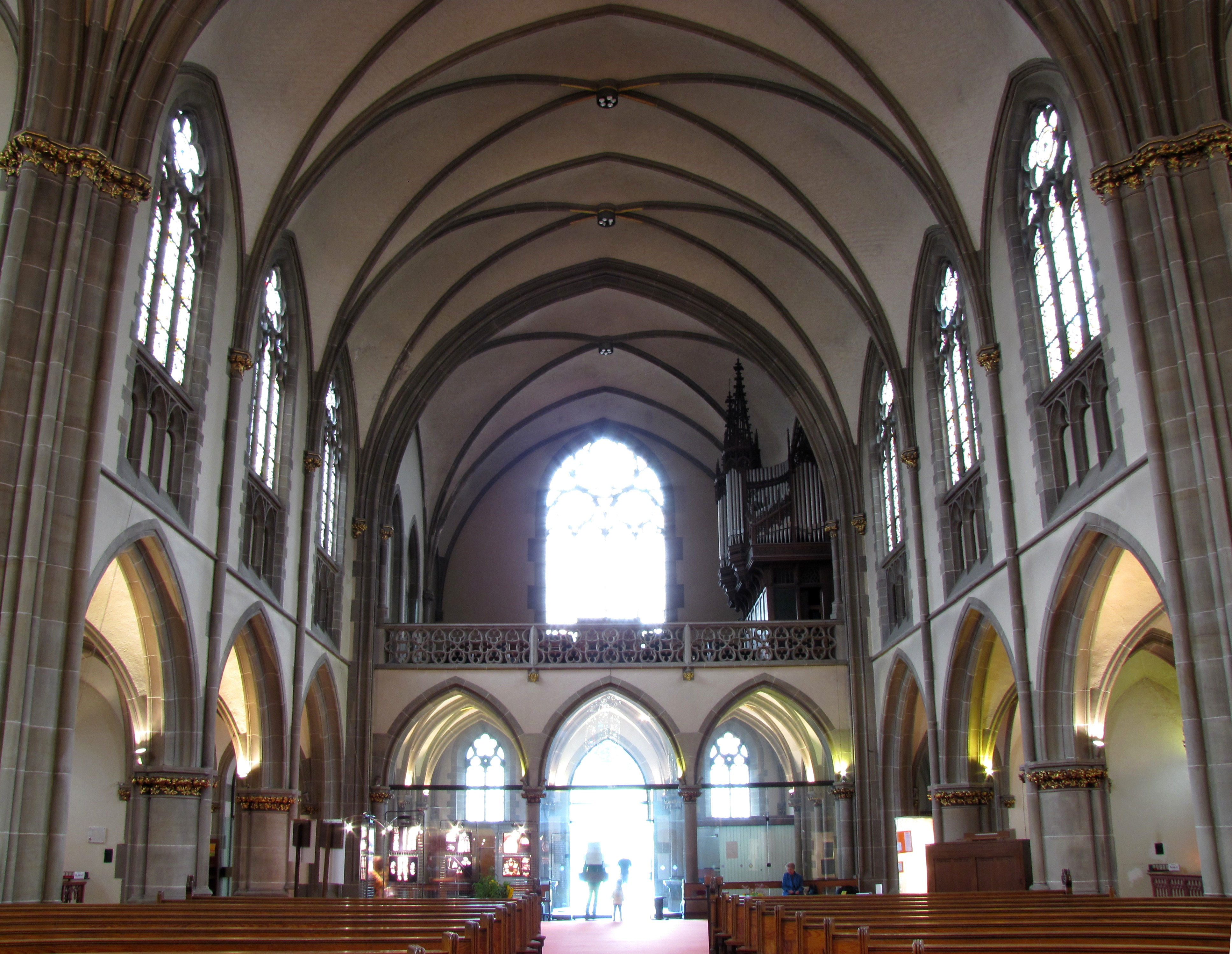 Alsace, Bas-Rhin, Église catholique Saint-Maurice (1899) de Strasbourg, avenue de la Forêt-Noire.Vue de la nef vers la tribune et l'orgue Friedrich Weigle (1899).